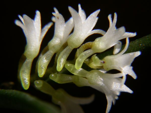 Campylocentrum parahybunense - Minas Gerais